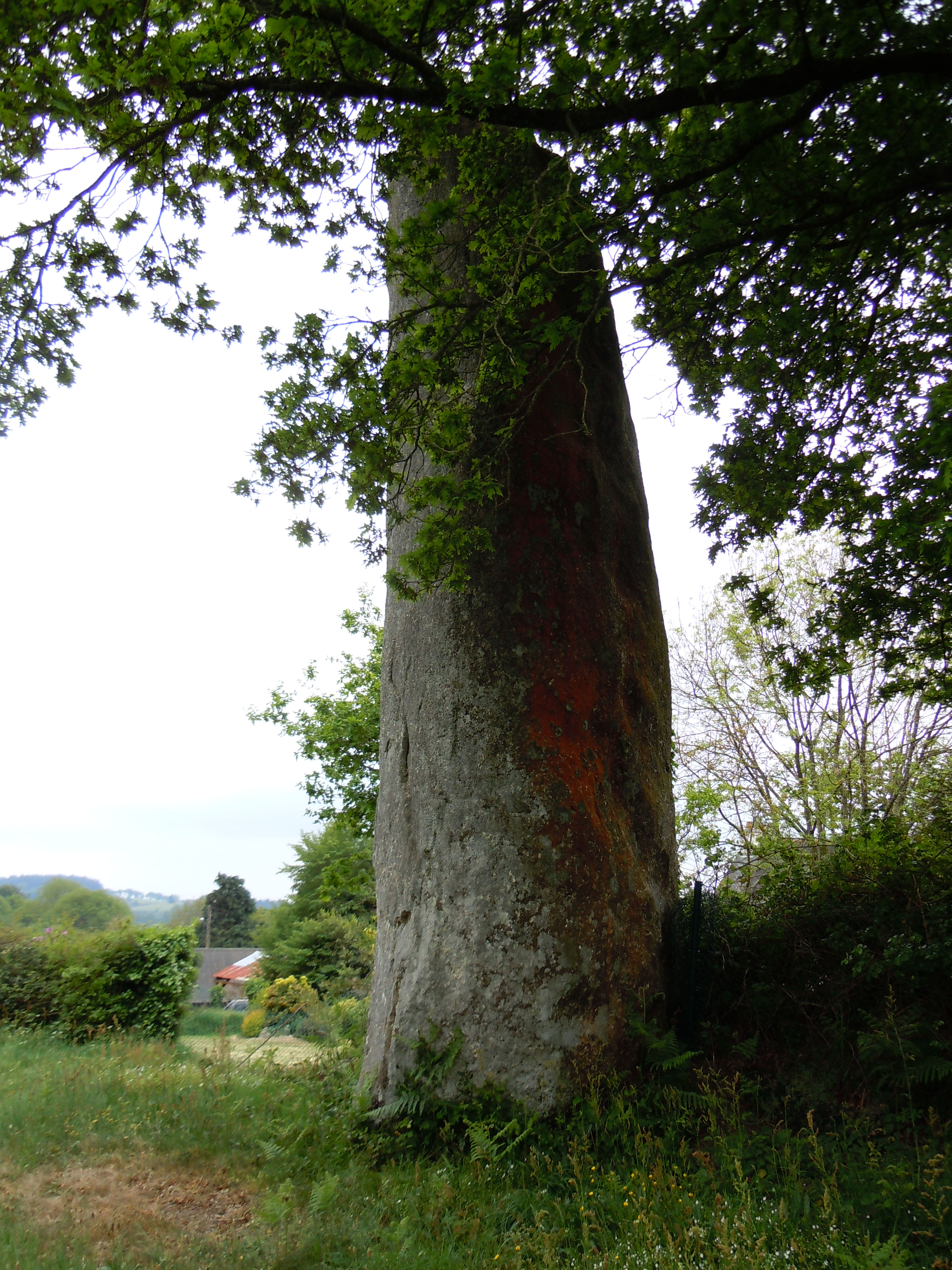 menhir de Glomel, vu de profil, département des Côtes-d'Armor, France